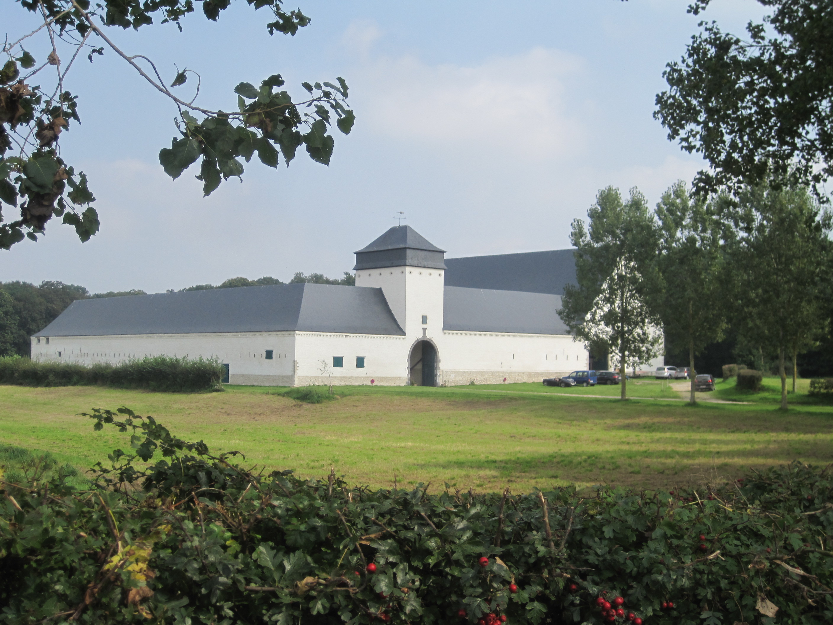 Biens classé en 1994 : Les façades et toitures de tous les bâtiments de la ferme de Wahenges ainsi que le pavé de la cour, la charpente de la grange, la structure et charpente de la remise, les voûtes et la charpente du corps de logis, la chapelle et son autel annexée au logis ainsi que le papier peint couvrant les murs de la deuxième pièce à droite de l'entrée du corps de logis #M#.